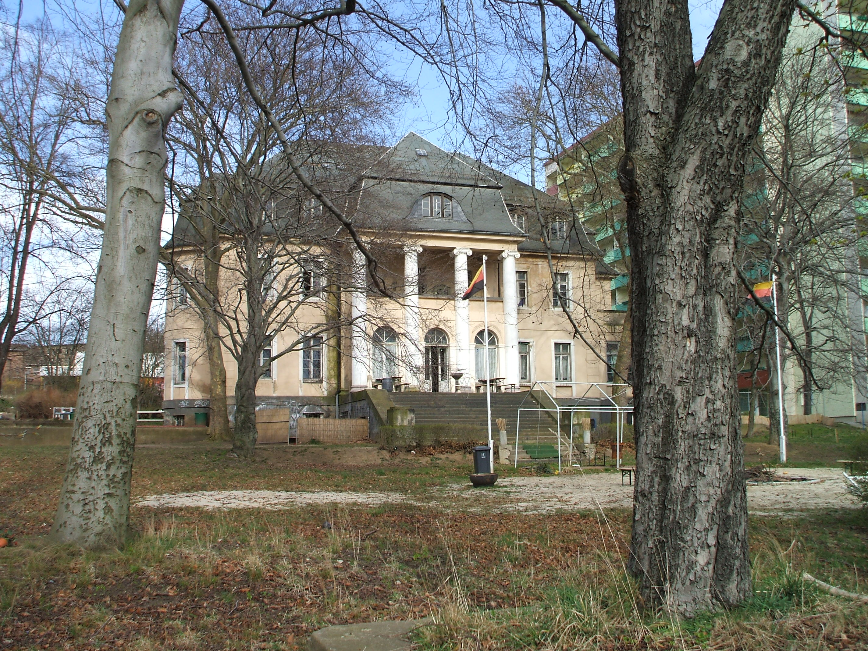 Villa Bardzki, Gera, Germany